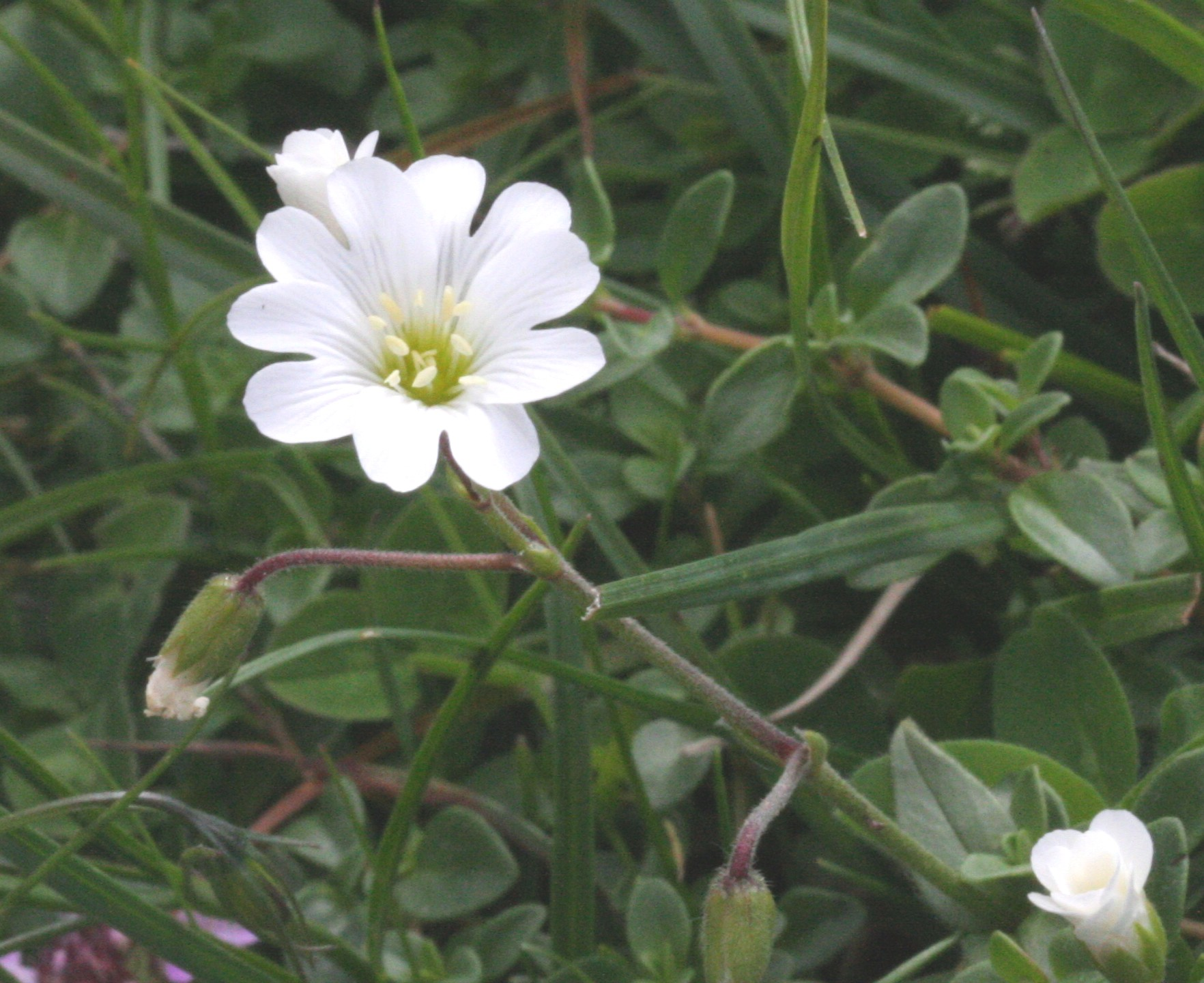 Cerastium alpinum (Peverina alpina)